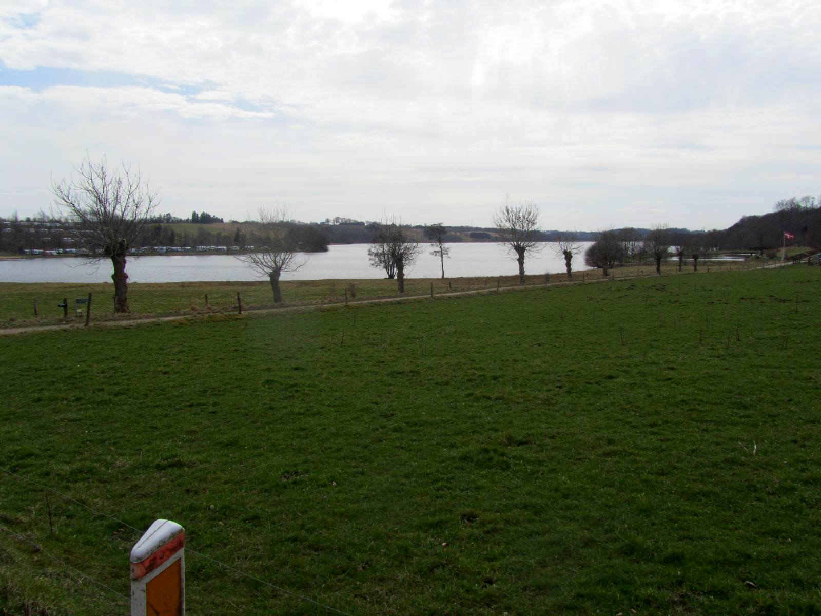 Faarup Sø set mod sydvest